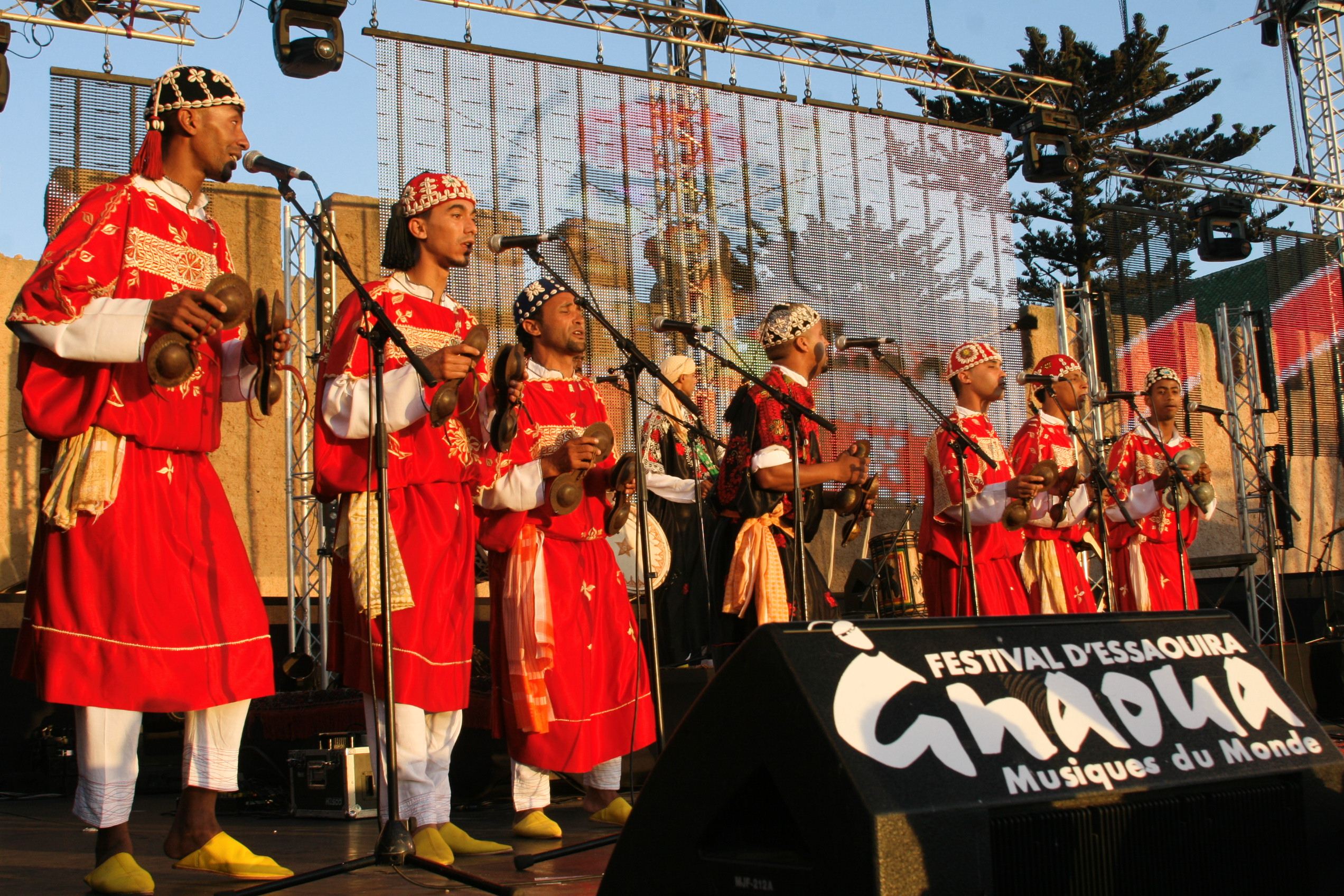 The 15th Gnaoua World Music Festival in Essaouira sought to bridge cultural divides by presenting a musical melting pot. تسعى الدورة الخامسة عشرة لمهرجان كناوة الموسيقي العالمي في الصويرة إلى التقريب بين الثقافات من خلال تقديم بوثقة موسيقية. Le 15ème Festival gnaoui des musiques du monde d'Essaouira a cherché à combler les fossés culturels en présentant un véritable melting pot musical.